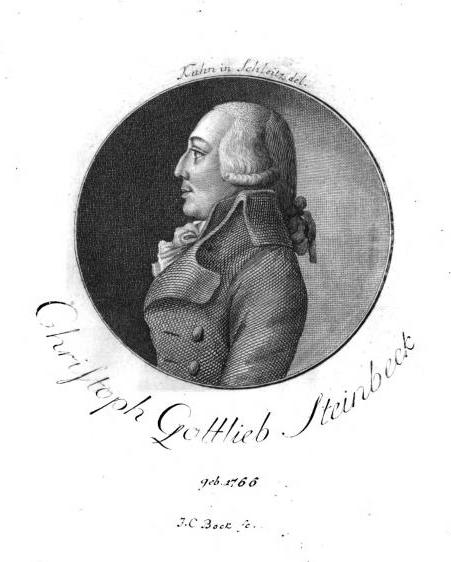 Portrait Christoph Gottlieb Steinbeck